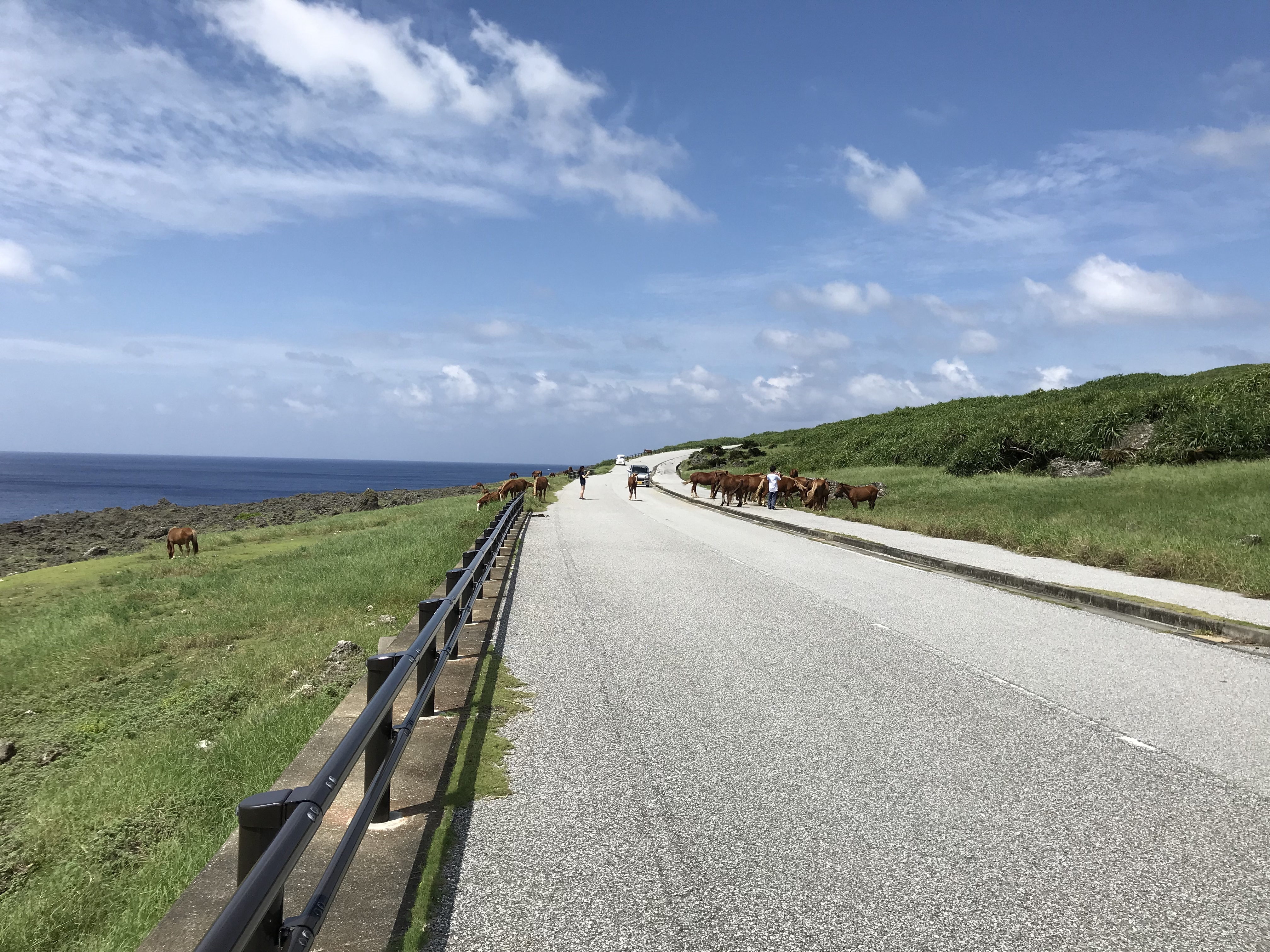 沖縄県与那国島南牧場線（フジテレビ系テレビドラマ『Dr.コトー診療所』ロケ地）